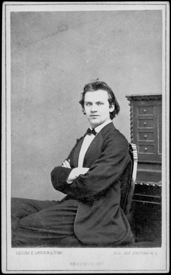 Franz Xaver Neruda (1843–1915) Danish cellist